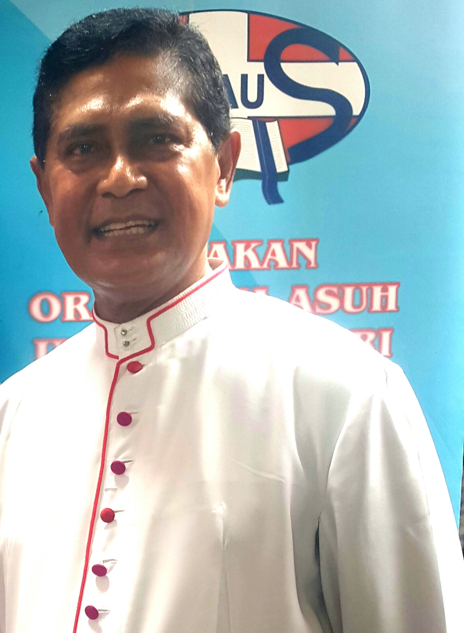 Mgr Vincentius Sensi Potokota, Uskup Agung Ende